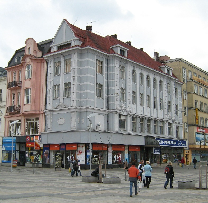 Masarykovo náměstí 30, Moravská Ostrava, Dům arch. W. Deiningera z roku 1912, bývalá budova Divadla Aréna, dříve obchodní dům dědiců I. Reisse.